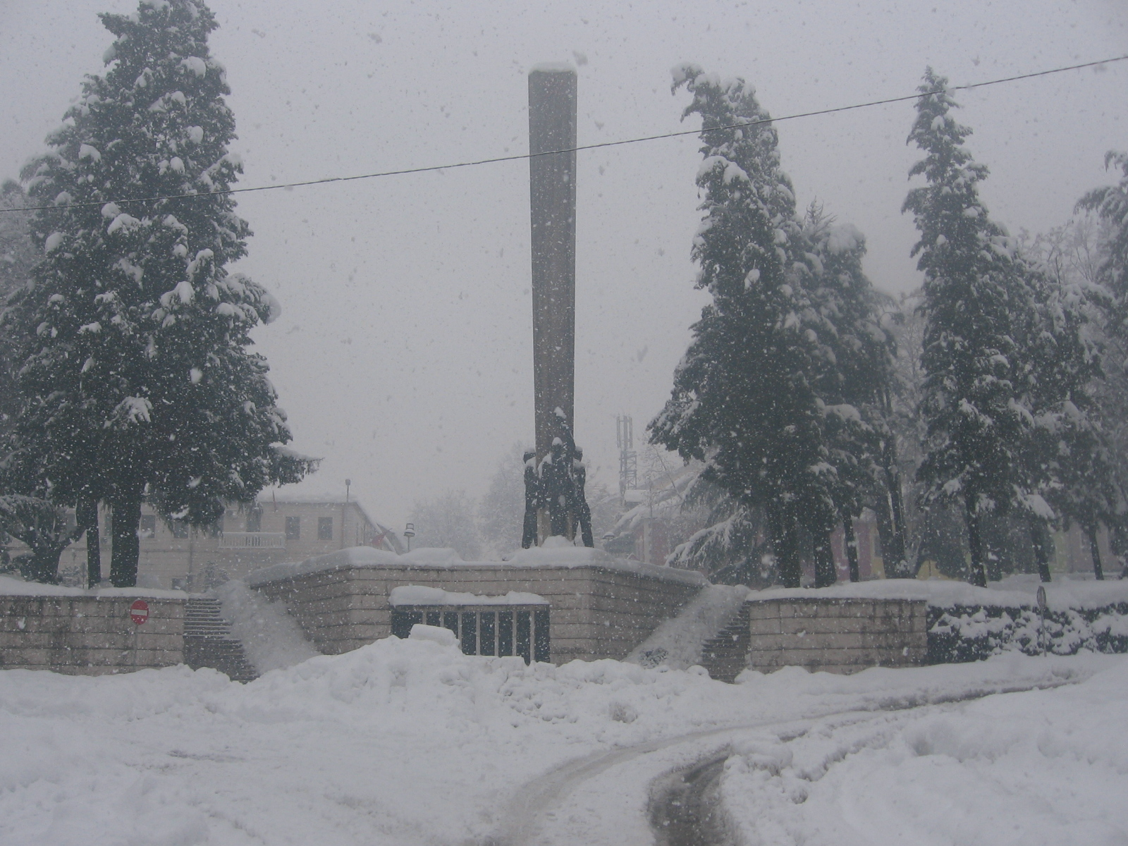 Centralni gradski trg (Trg 9. decembar) sa spomeničkim kompleksom, u pozadini zgrada SO Danilovgrad.